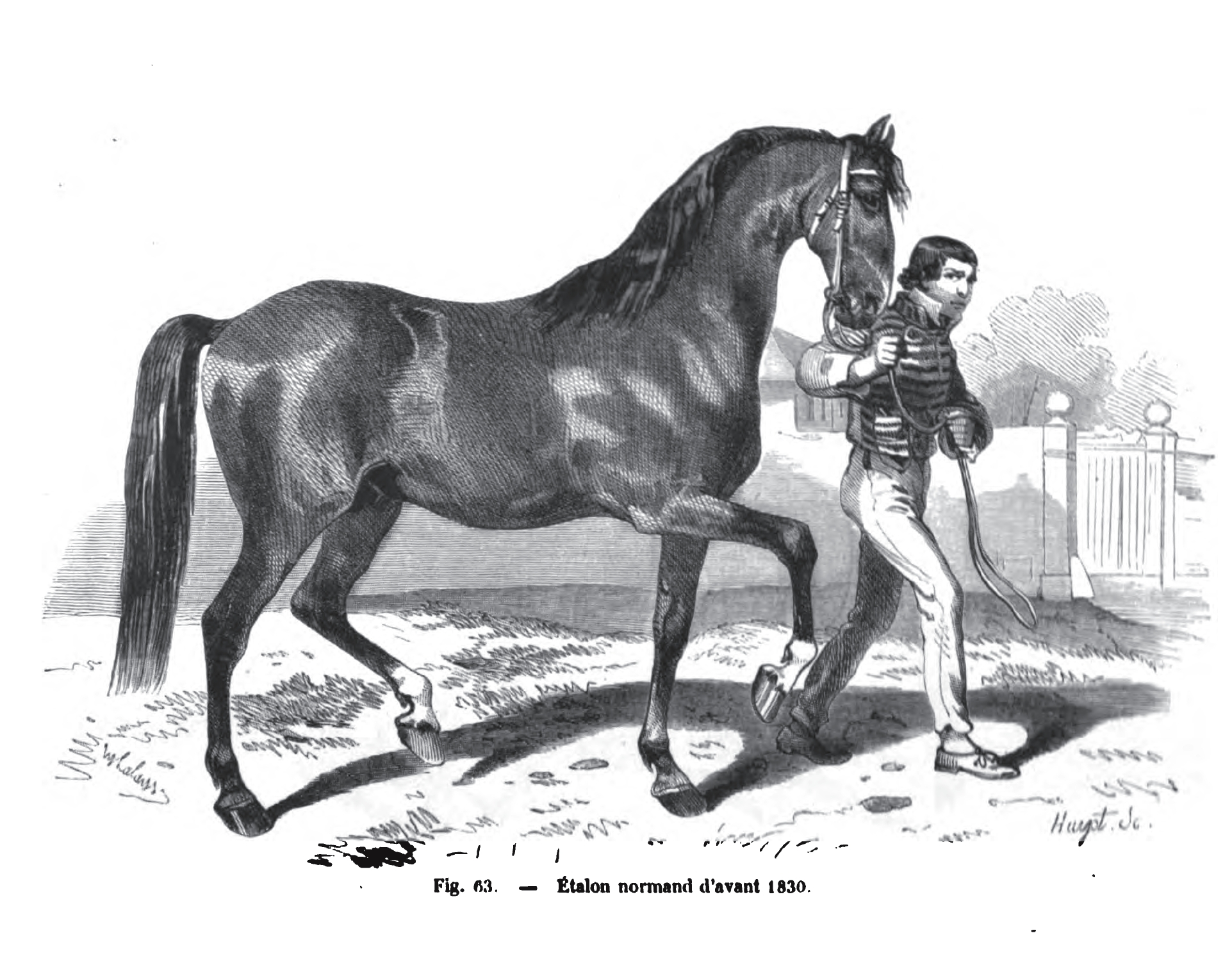 Anglo-Norman